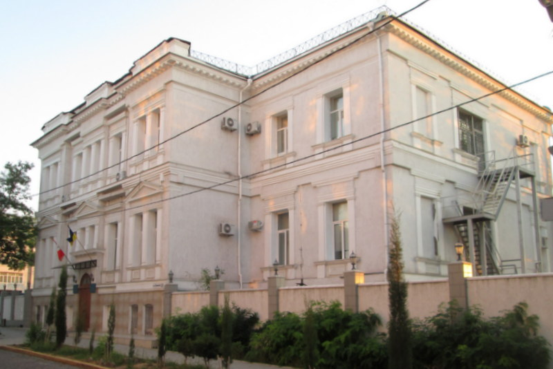 Севастопольський міський апеляційний суд